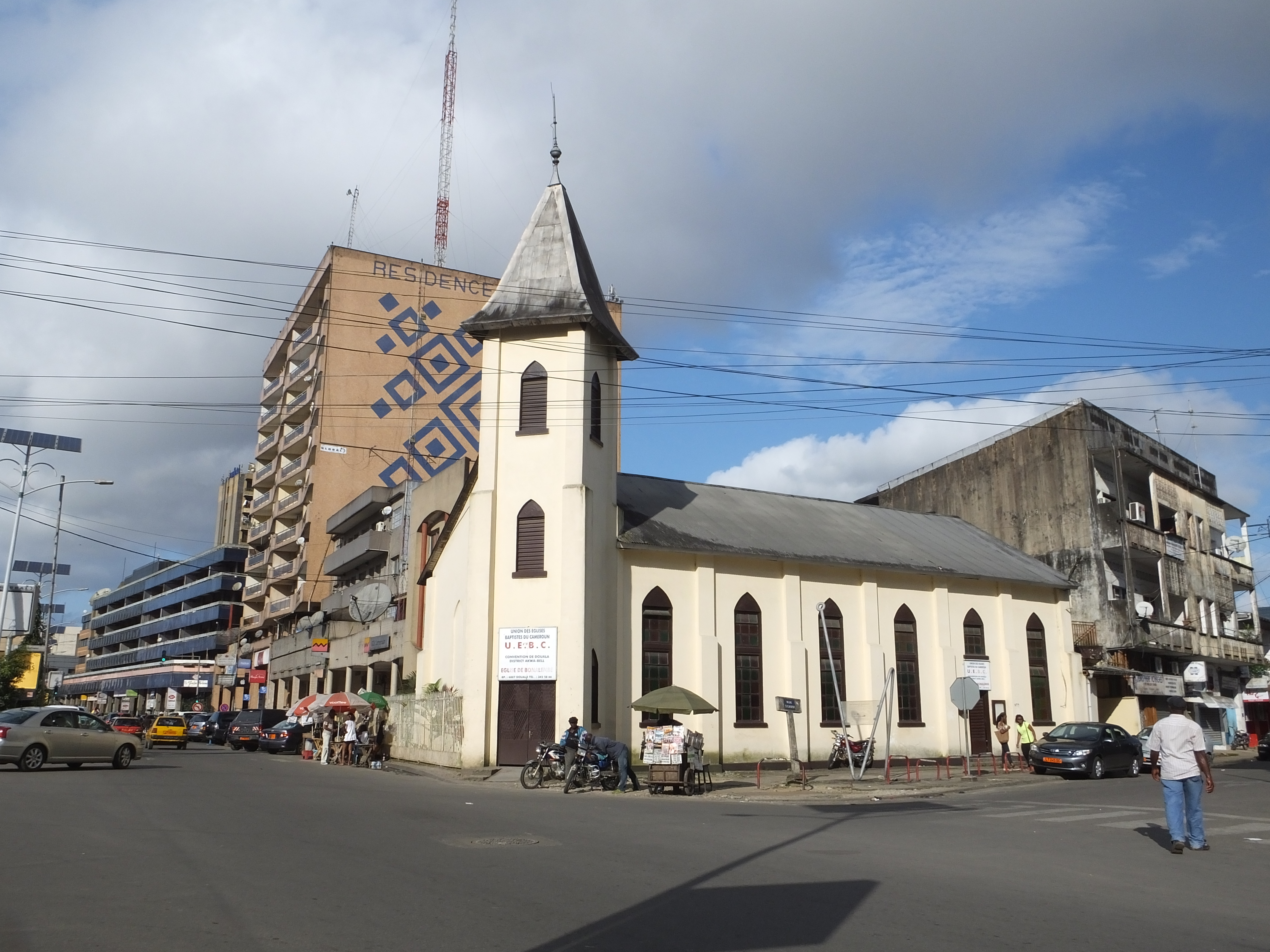 Temple de Bonalembe